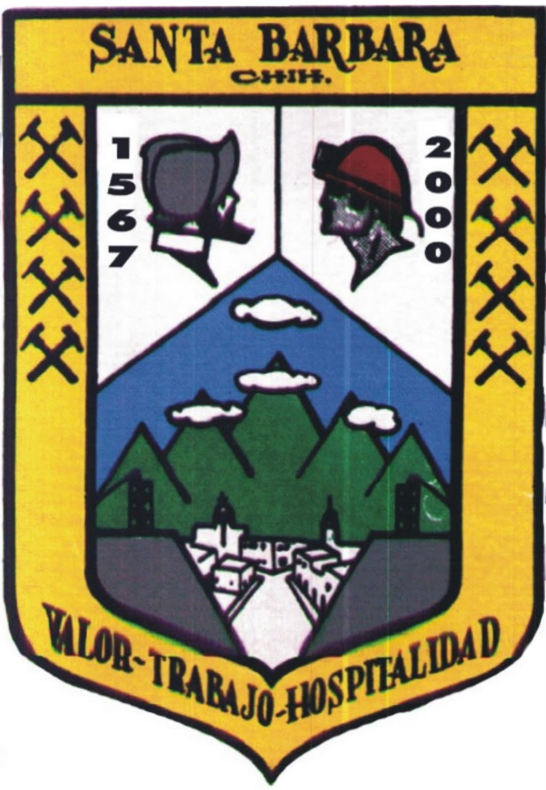 Escudo